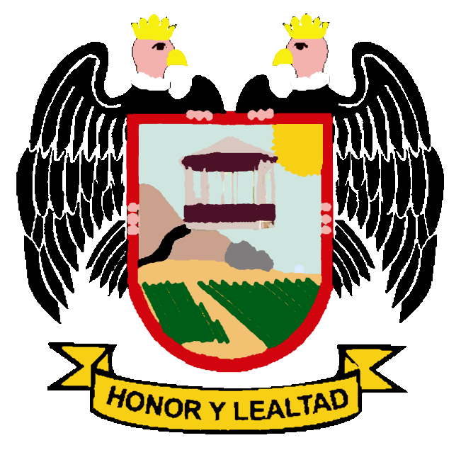 Distrito de Aucallama Provincia de Huaral Departamento de Lima